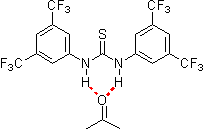 H.Brücken Koordination von Thiourea T1, Mike Kotke, selbst erstellt